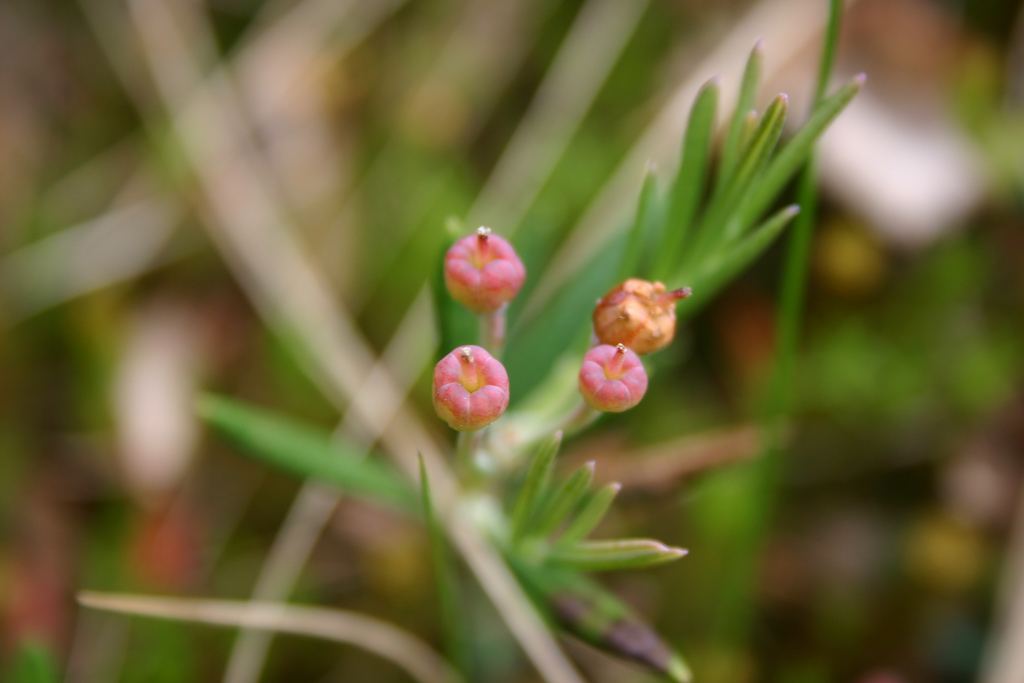 Andromeda polifolia